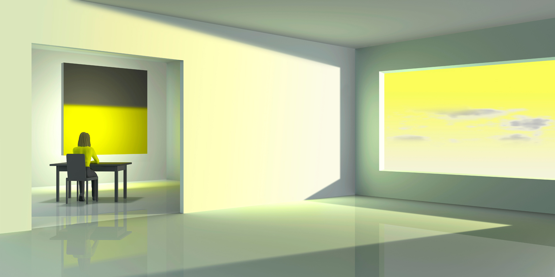 Obra premiada en el Premio Internacional de pintura Focus Abengoa